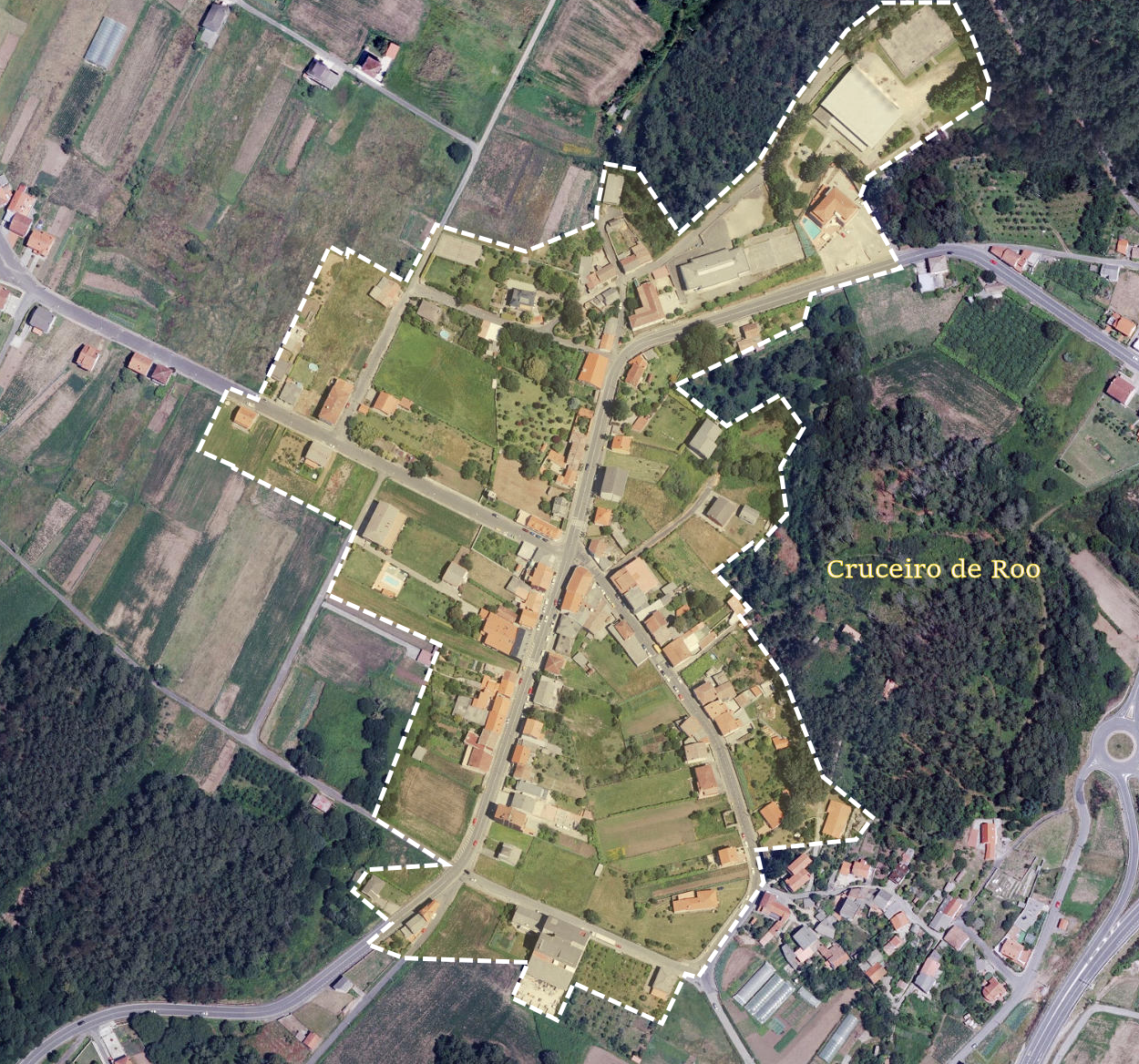 Imagen aerea de Cruceiro de Roo de 2014, con sus límites